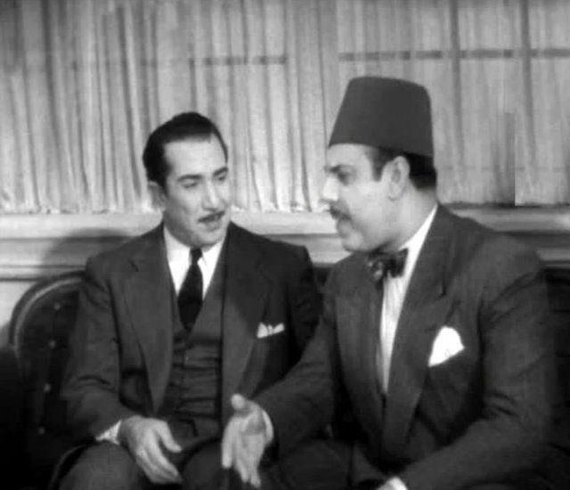 الممثلان يوسف وهبي وسراج منير في مشهد من فيلم شمعة تحترق